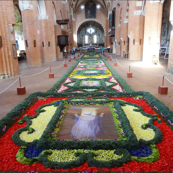 L'Infiorata si inaugura ogni anno la domenica del Corpus Domini e si protrae per le successive due settimane.